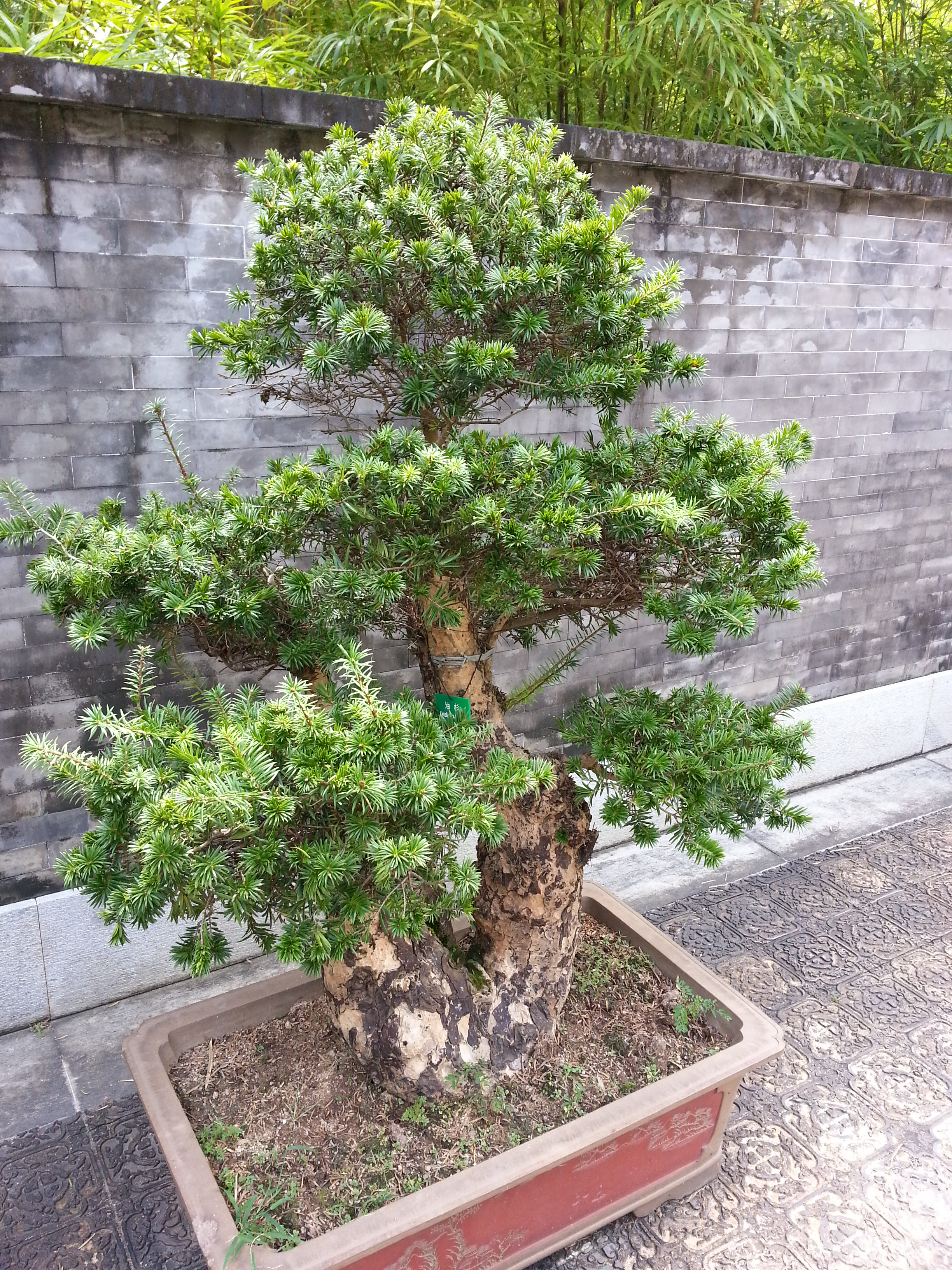 Keteleeria fortunei 油杉 in Lai Chi Kok Park